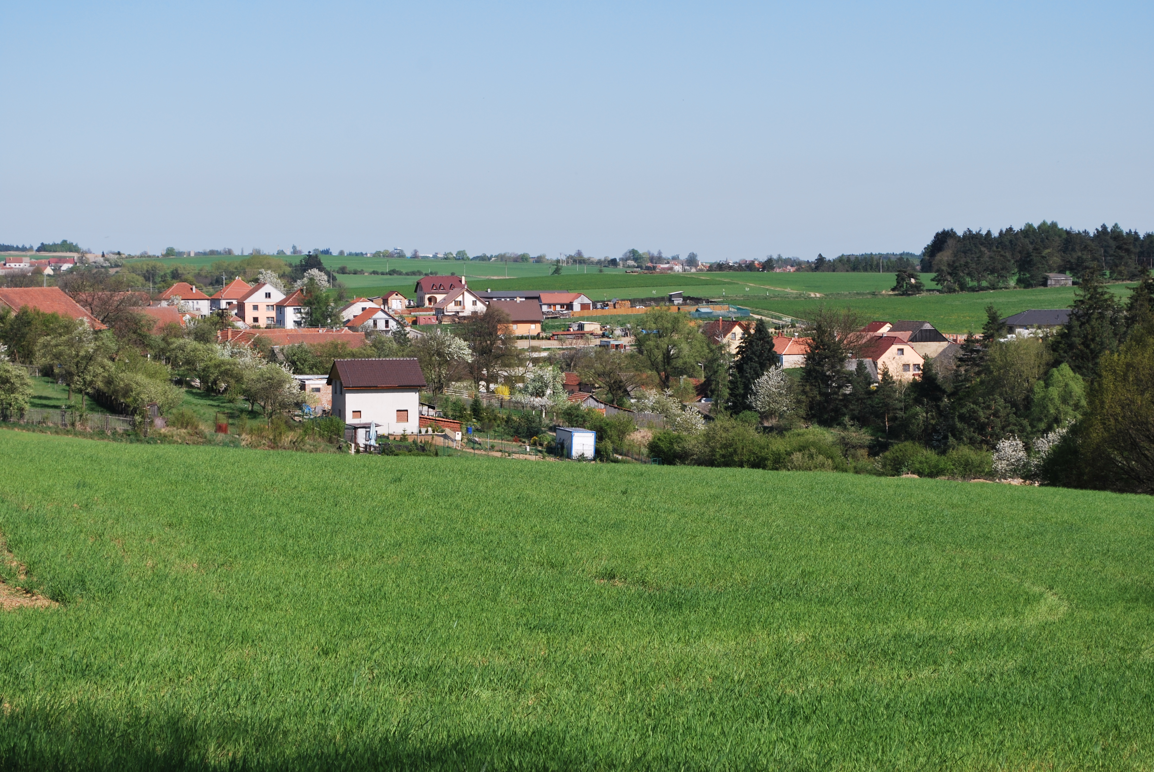 Kozlany-alibaba